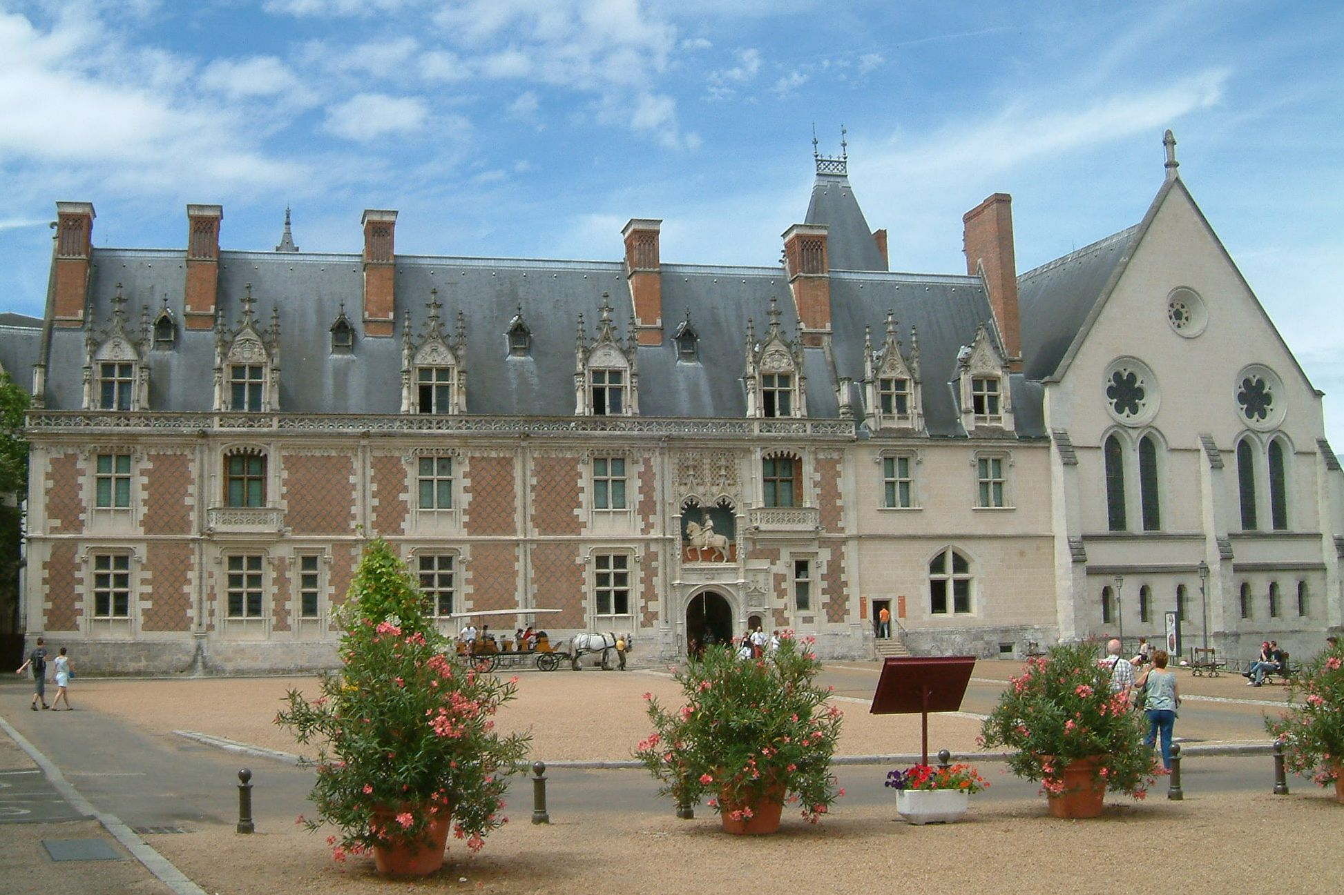 Château de Blois, Blois, FRANCE